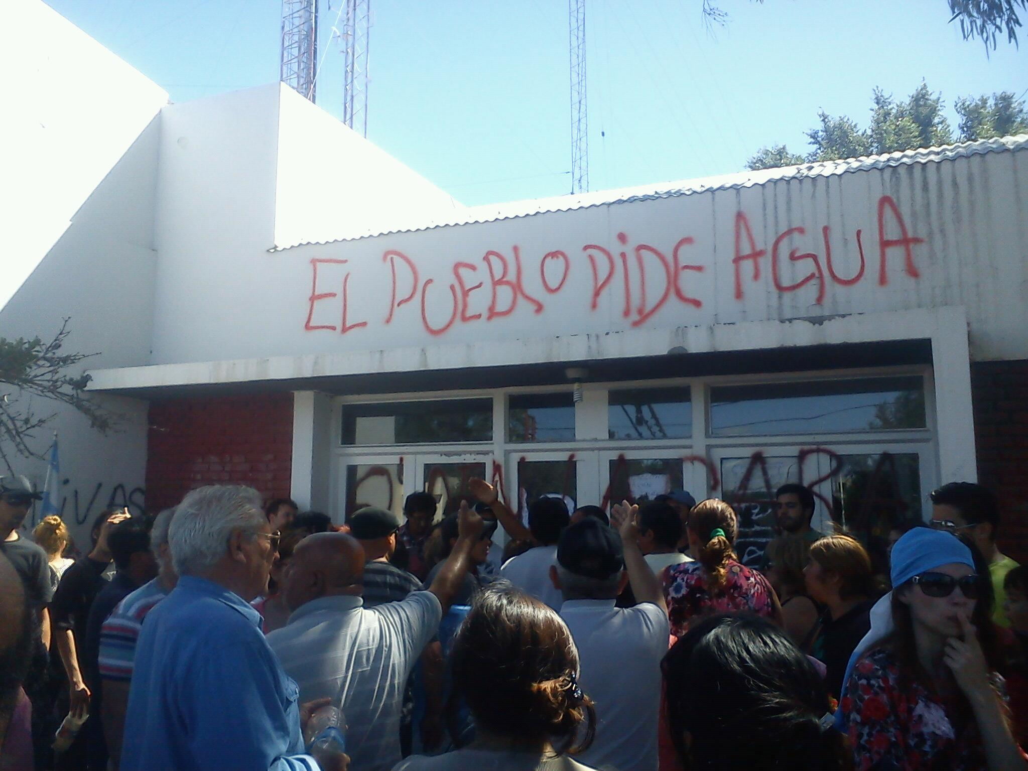 Situacion de la escasez de agua